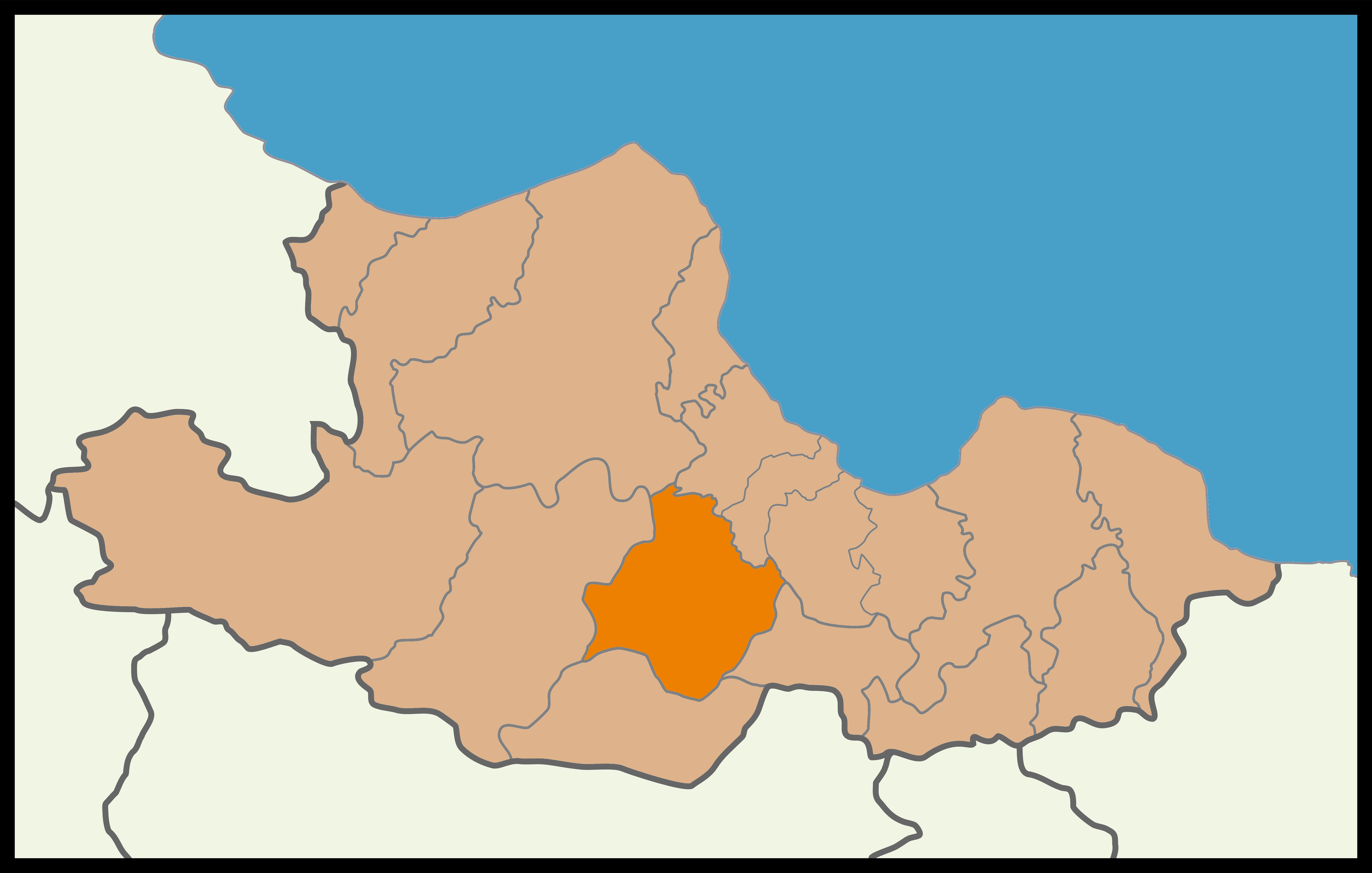 Samsun'un Kavak ilçesinin 2014 Türkiye yerel seçimleri haritası.